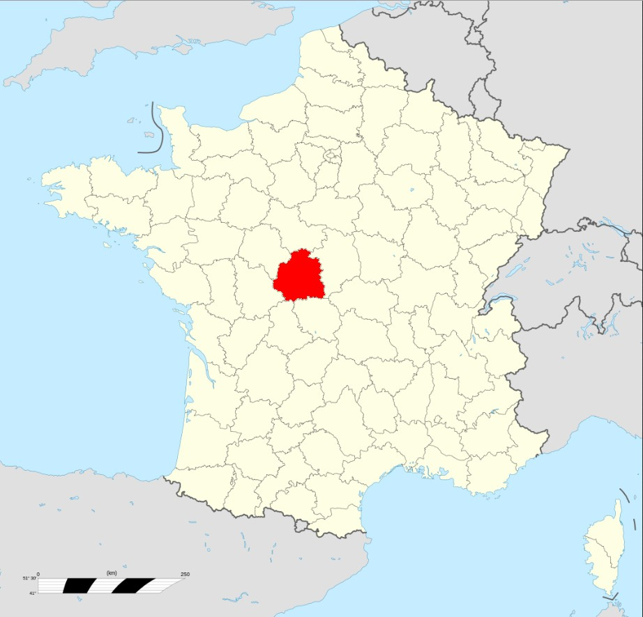 Carte administrative représentant le département de l'Indre sur une carte de France métropolitaine.